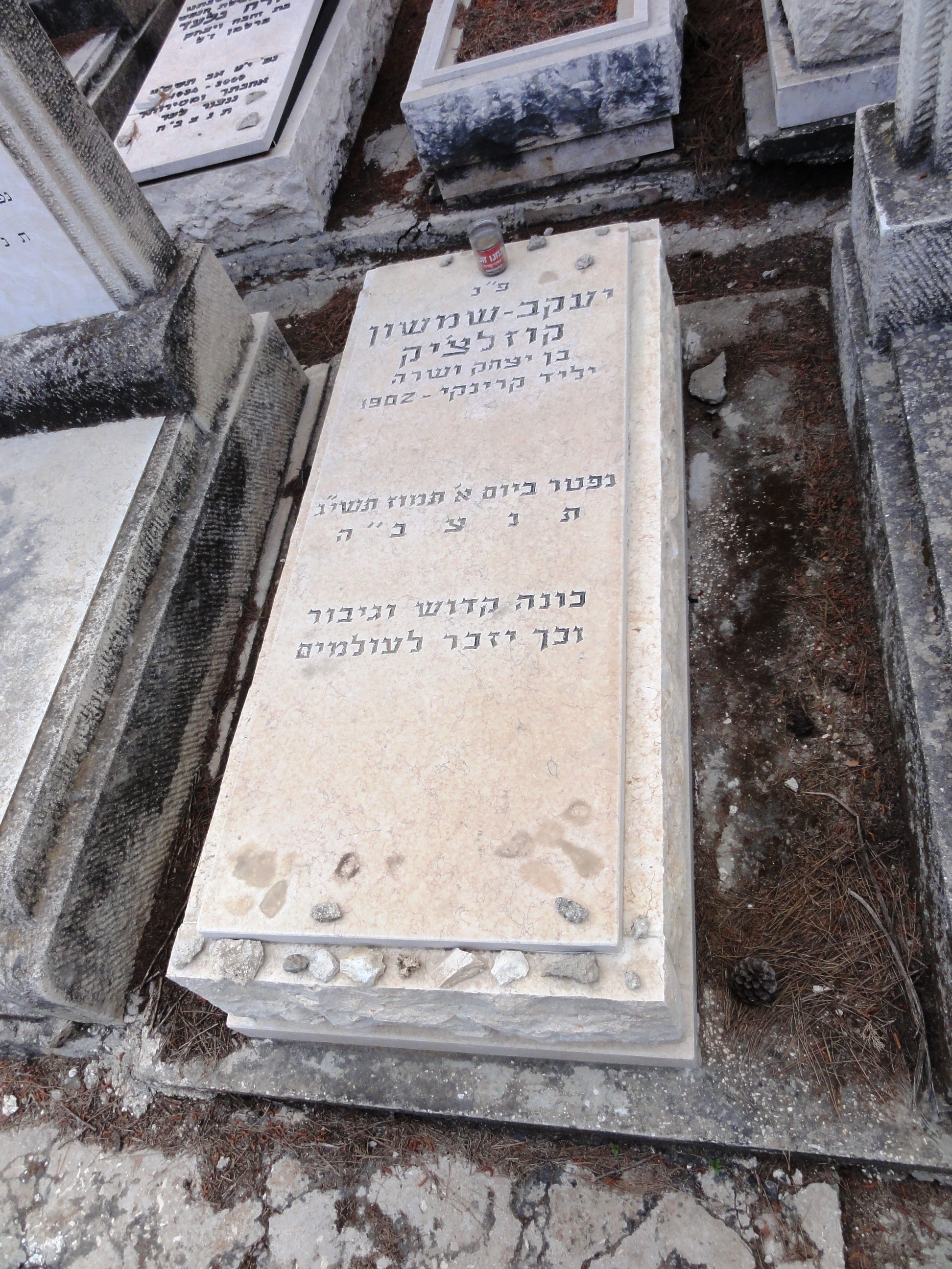 קברו של יעקב קוזלצ'יק